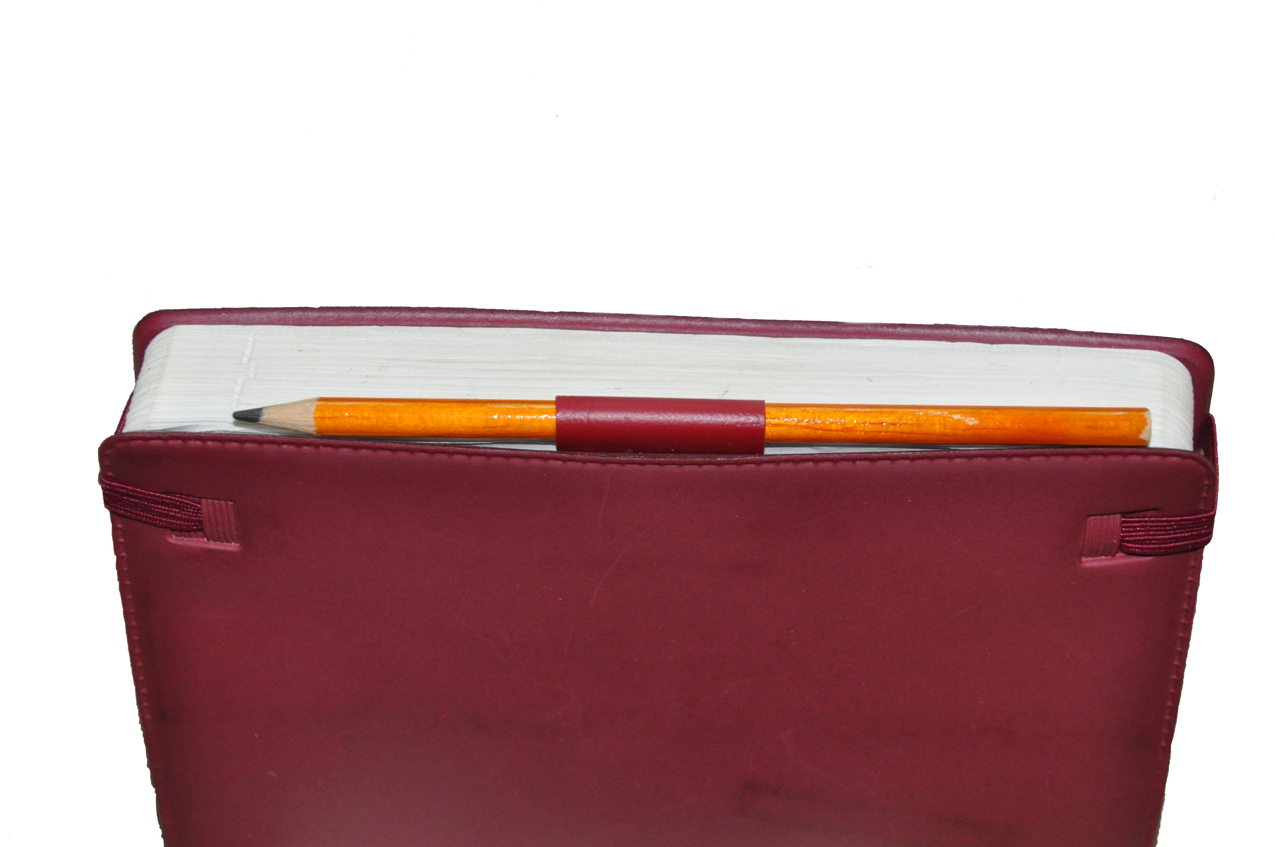 Agenda avec crayon intégré.